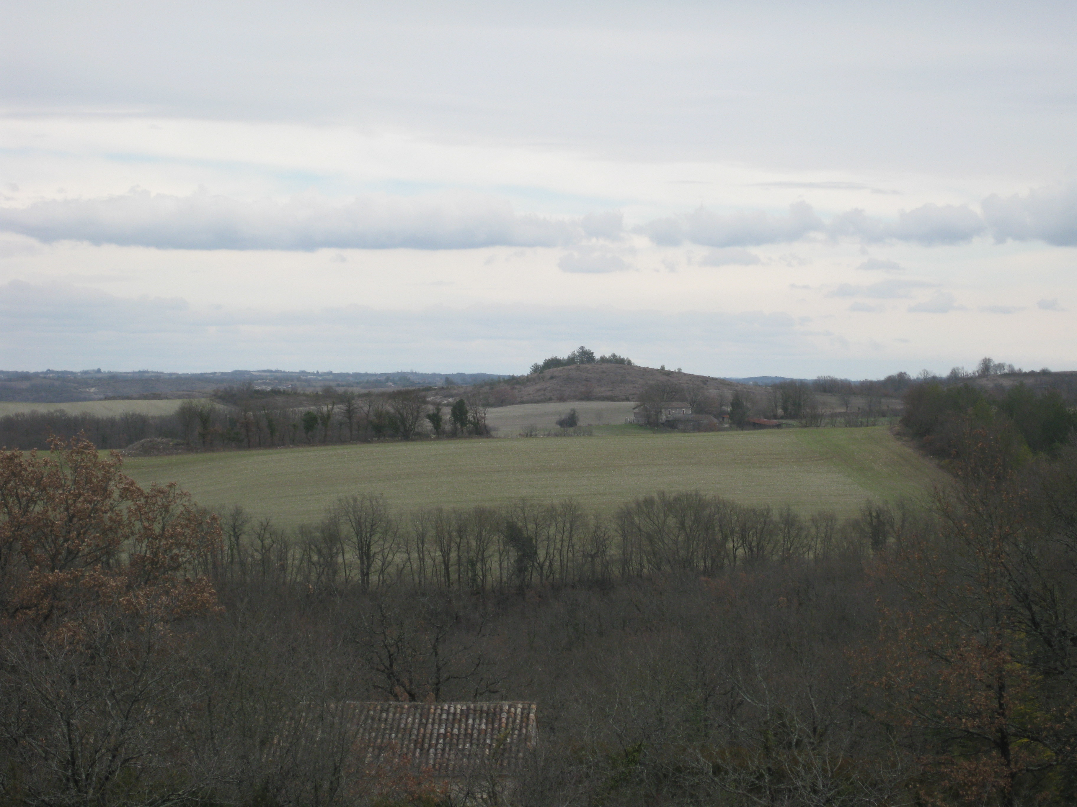 Mont Robert, Lot, France